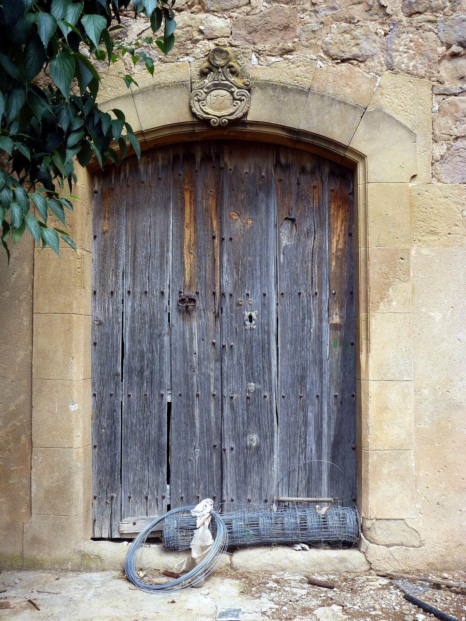 Masia Auguets (Pinell de Solsonès): portada de la capella